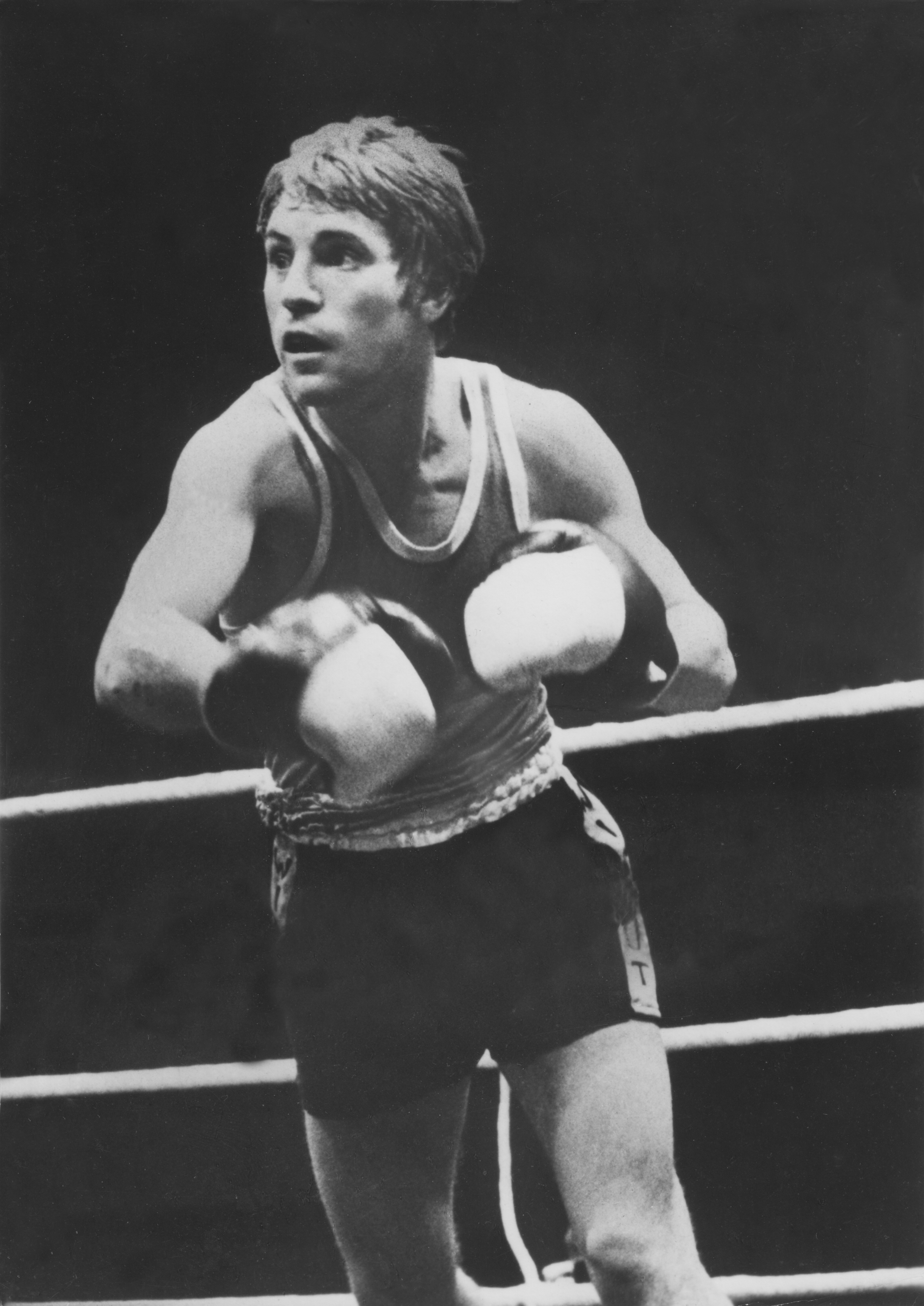 Stefan Förster_1977